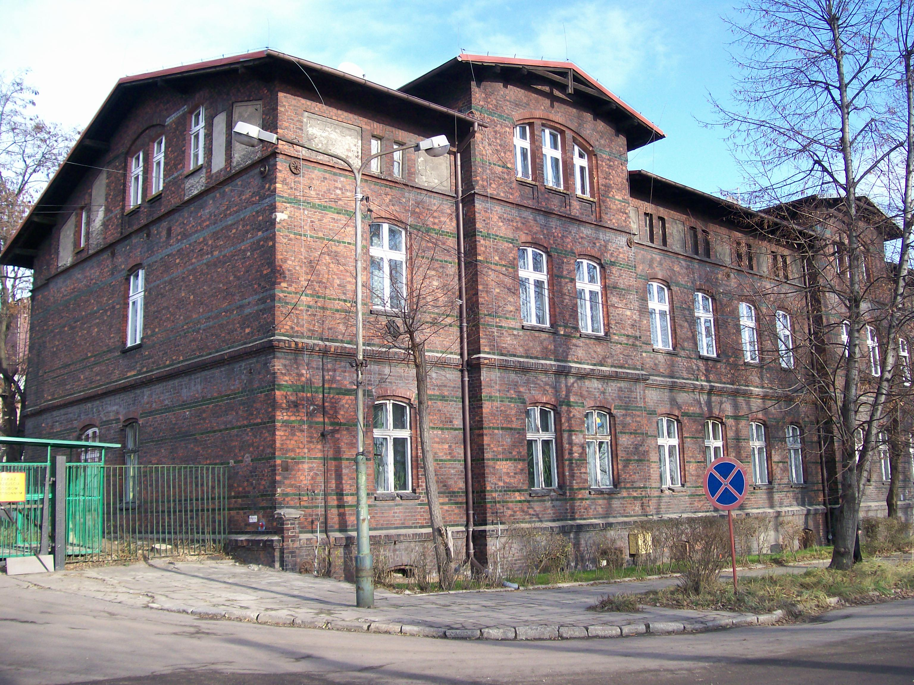 description: Familok obok nieczynnej Kopalni Węgla Kamiennego "Katowice" znajdujący się: Katowice-Bogucice, ulica Kopalniana. Author:Ewkaa